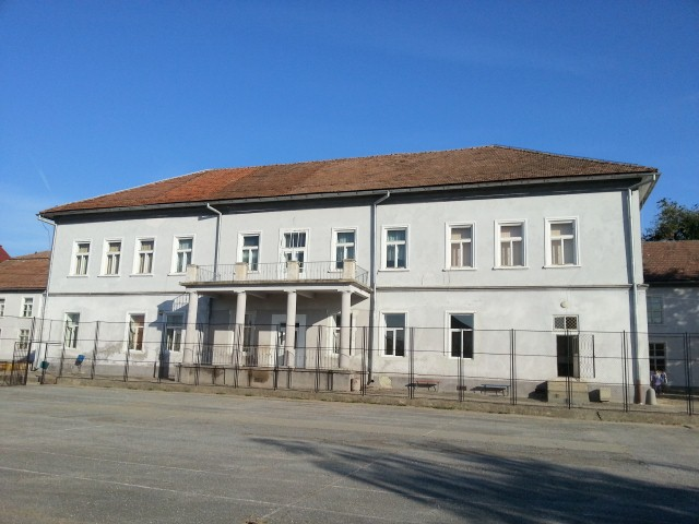 Școala Generala Grigore Sisali